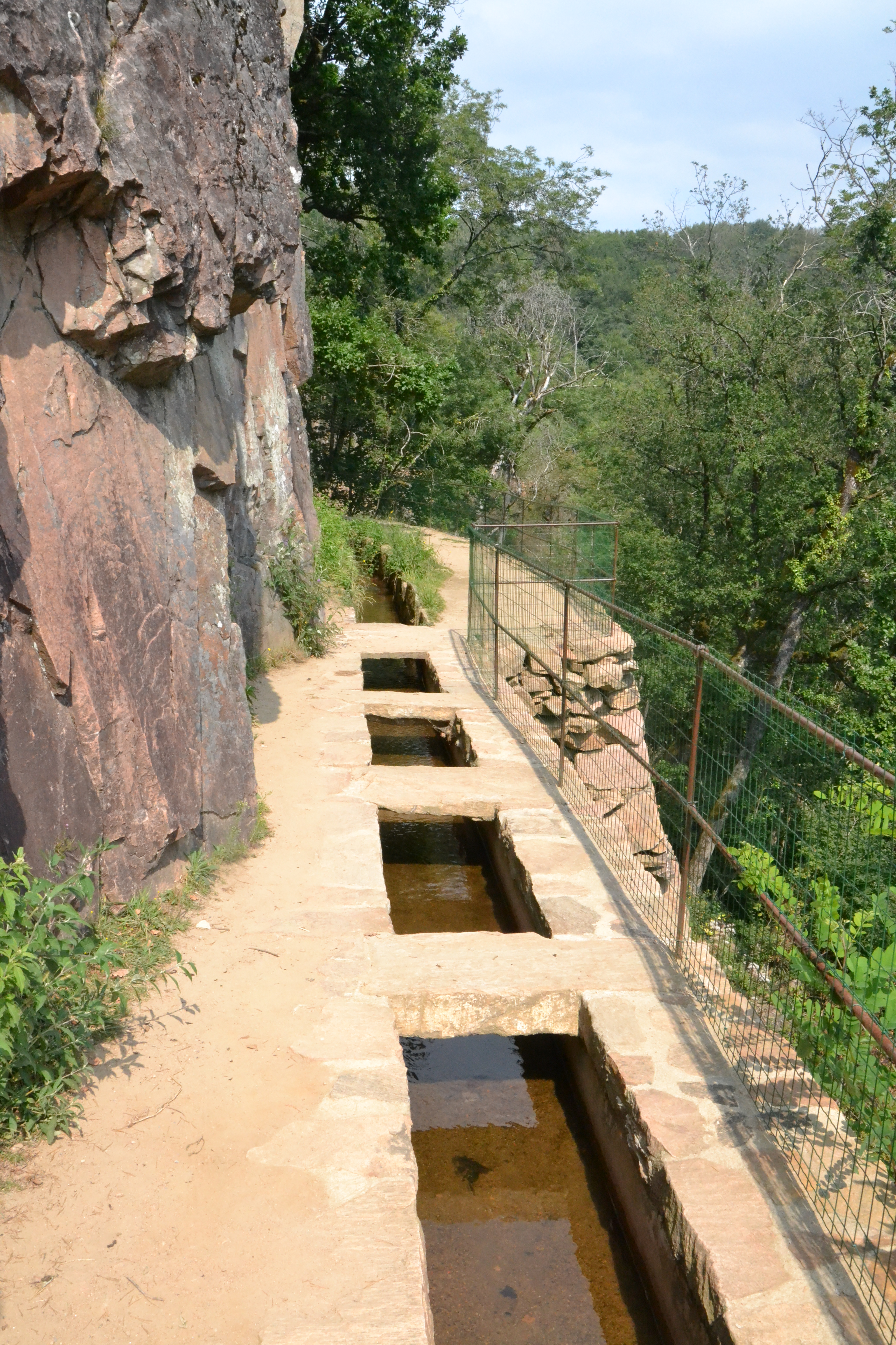 Le canal des moines d'Aubazine (Corrèze, France)